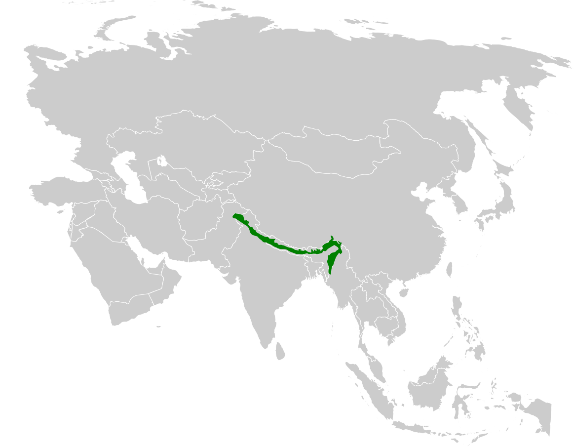 Phylloscopus xanthoschistos distribution map, based on